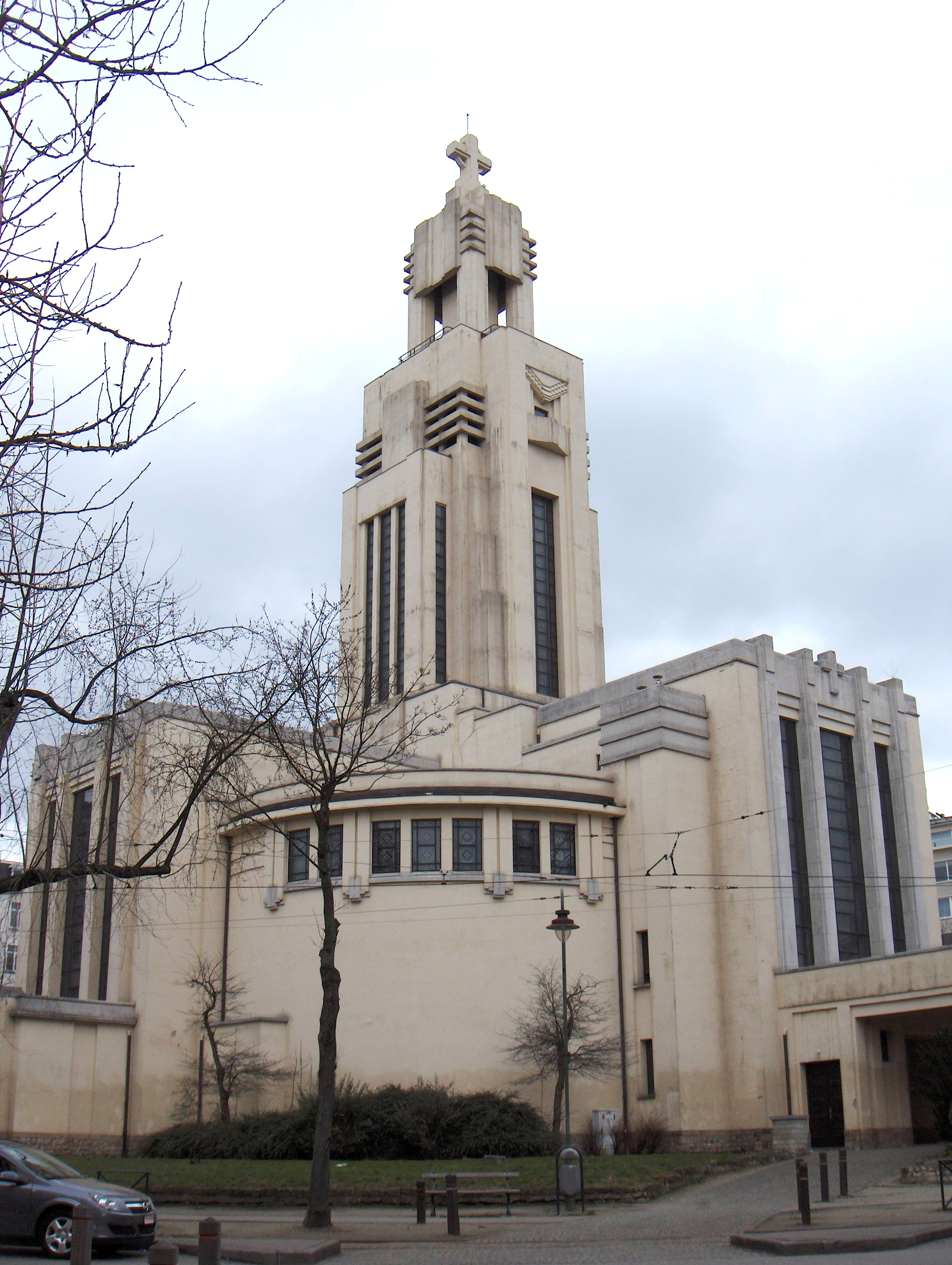 Beschreibung: Vorst (ndl.) - Forest (frz.), Augustinikirche auf dem Hoogte Honderdplein/place de l'Altitude Cent. Beton, 1936 vollendet, Art Deco. Architekten: André Watteyne und Léon Guianotte. Datum: 26. März 2006 Fotograf: Friedrich Tellberg